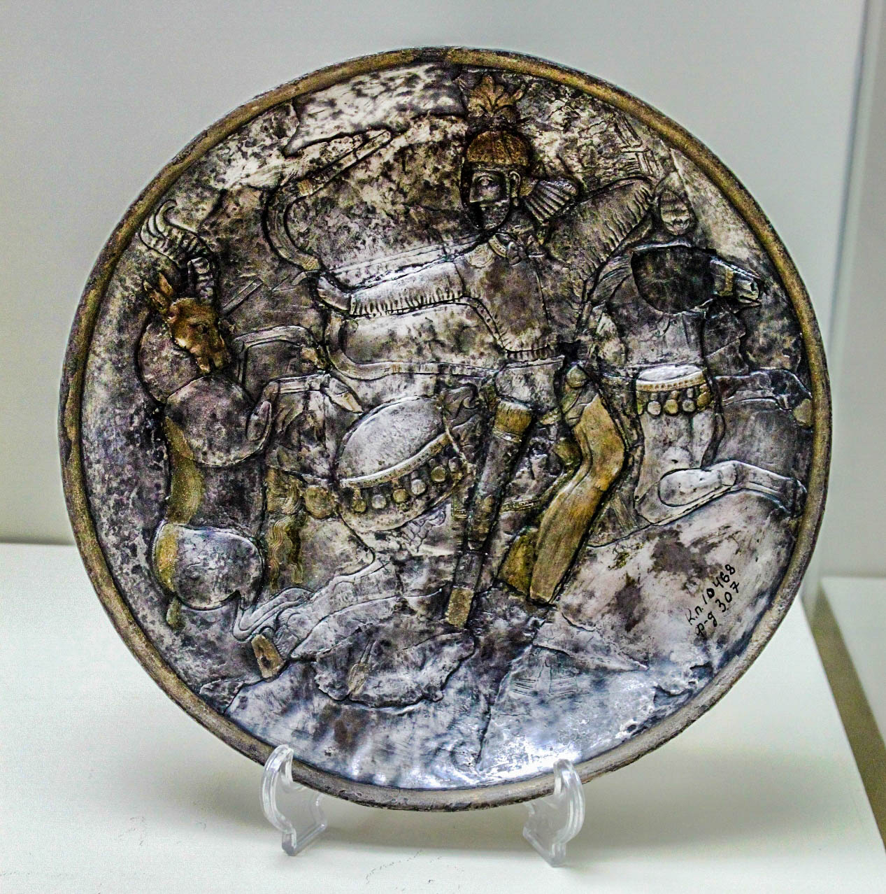 Медное блюдо.